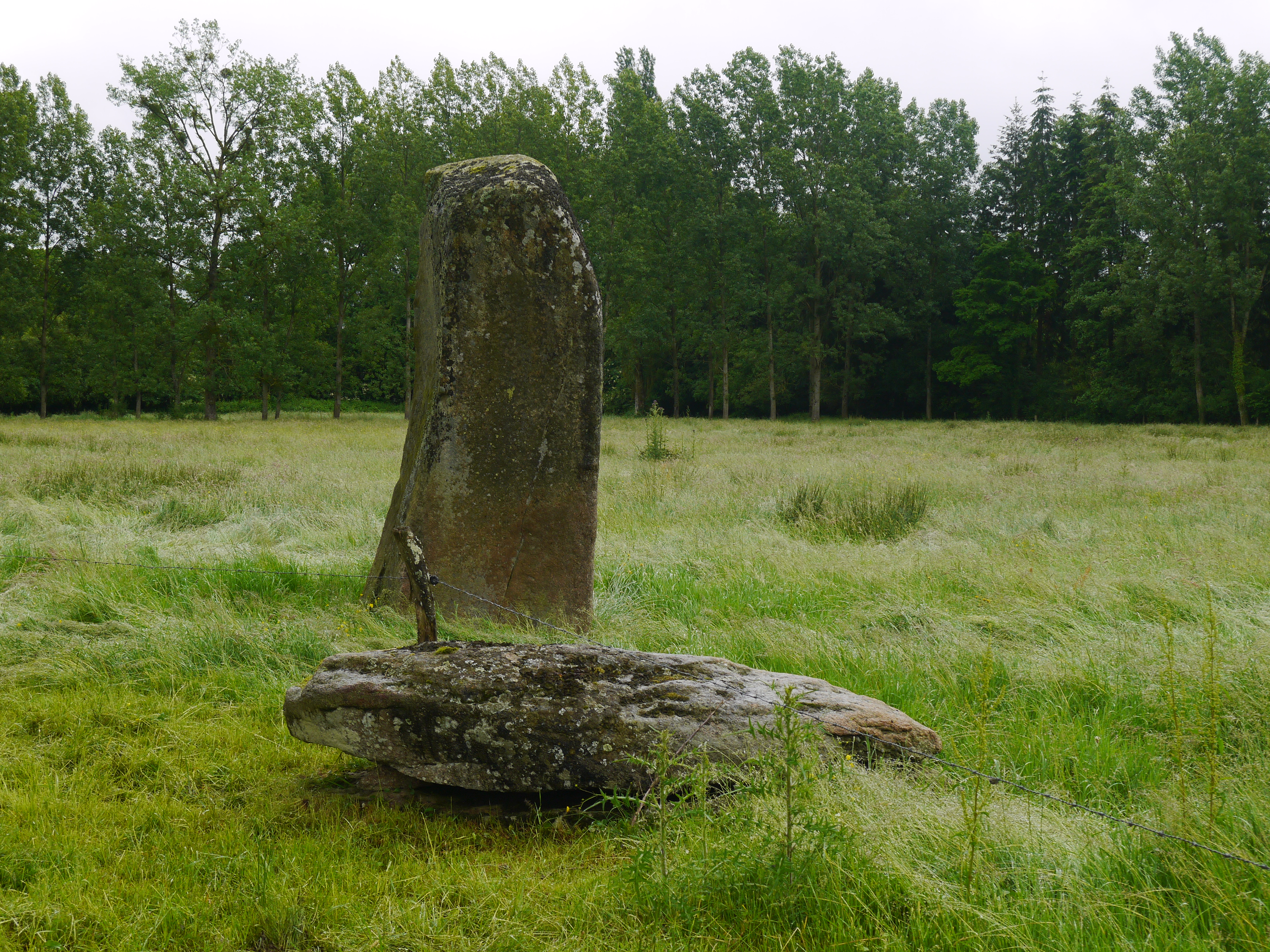 Le menhir et un des blocs à ses pieds.